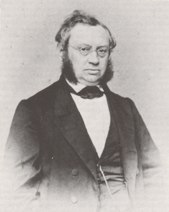 August Rudolph Oberbürgermeister von Marburg und Abgeordneter des Kurhess. Landtags 1862/1863